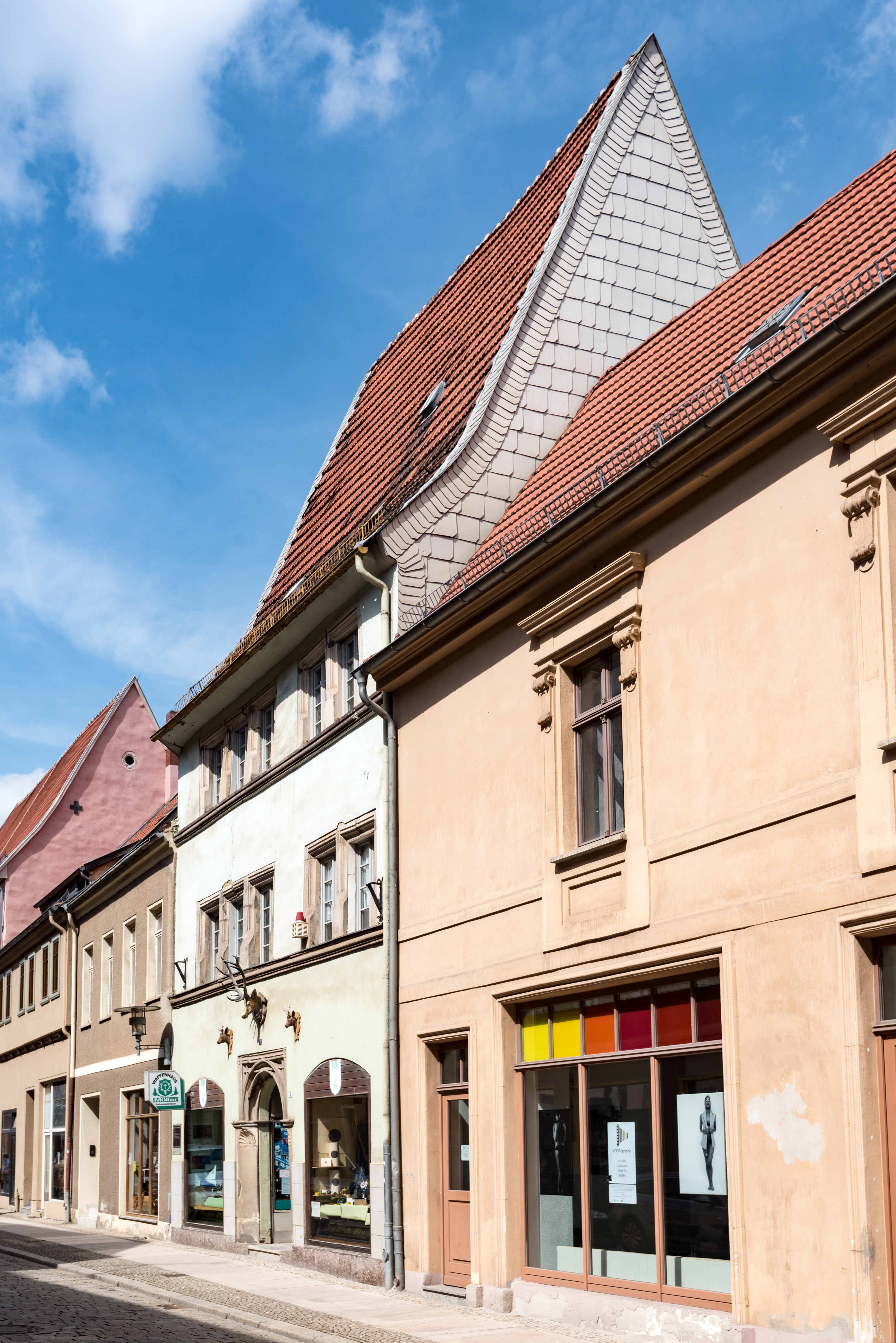 Aschersleben, Hohe Straße 1